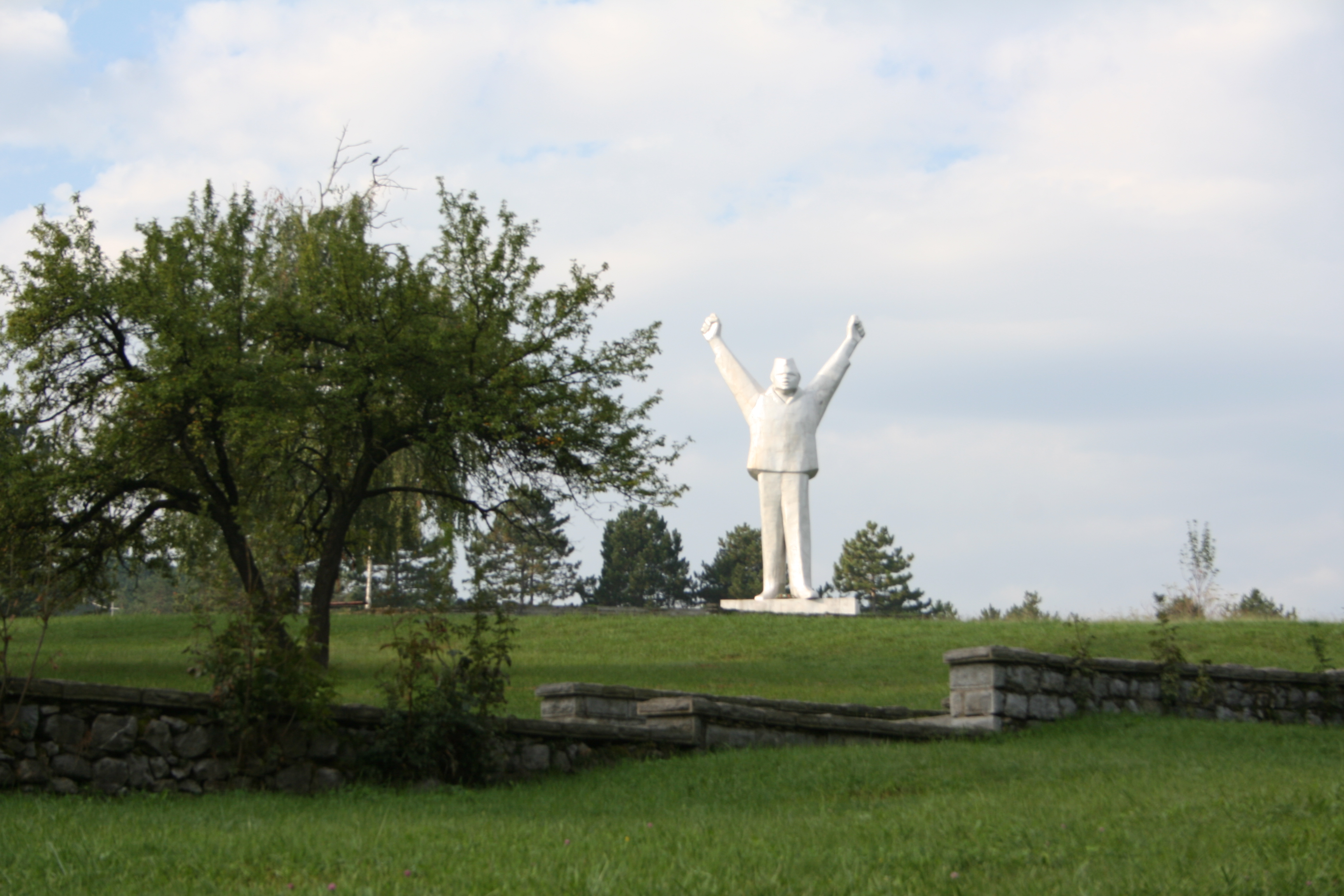 Spomenik borcima revolucije, Valjevo